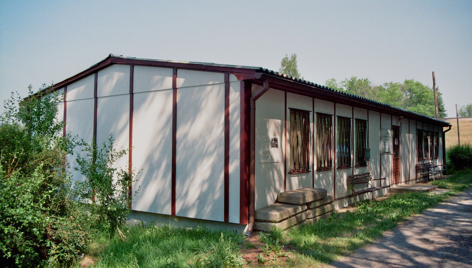 In einer ehemaligen Häftlingsbaracke eingerichtetes Kleinmuseum der Gedenkstätte Arbeitslager Lieberose 1943-1945 neben dem Friedhof in Lieberose, Landkreis Dahme-Spreewald, Brandenburg, Deutschland.